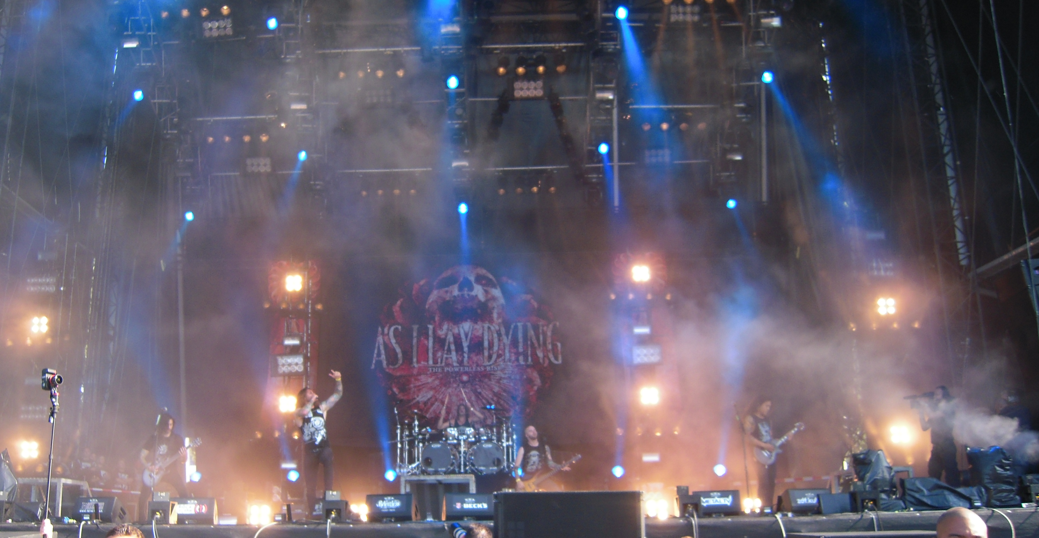 Band: As I Lay Dying - Ort der Aufnahme: Wacken Open Air Festival 2011 (Wacken, Schleswig-Holstein)